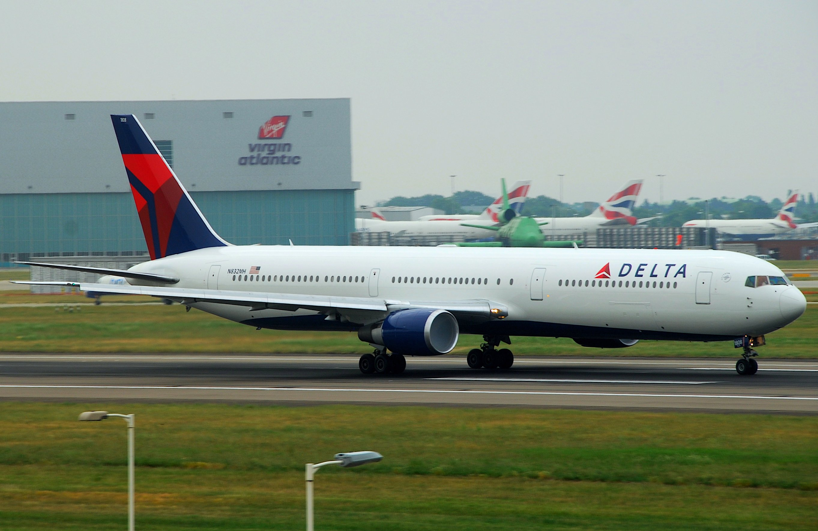 Delta Air Lines Boeing 767-432ER; N832MH@LHR;06.06.2010/577bi